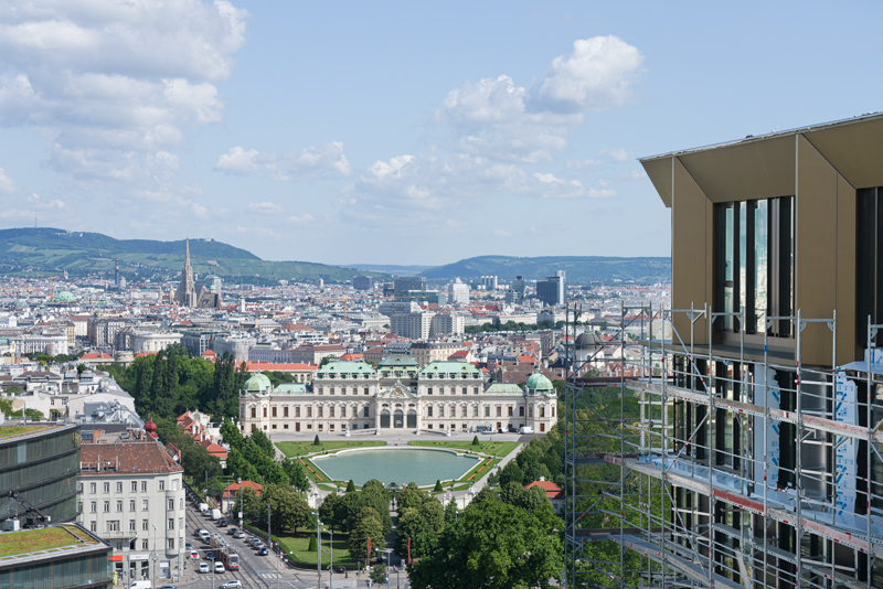 Der Ausblick aus vielen Wohnungen der Bel & Main Residences reicht über den Schweizergarten und das Schloss Belvedere über den Stephansdom bis weit über das Wiener Stadtgebiet hinaus.